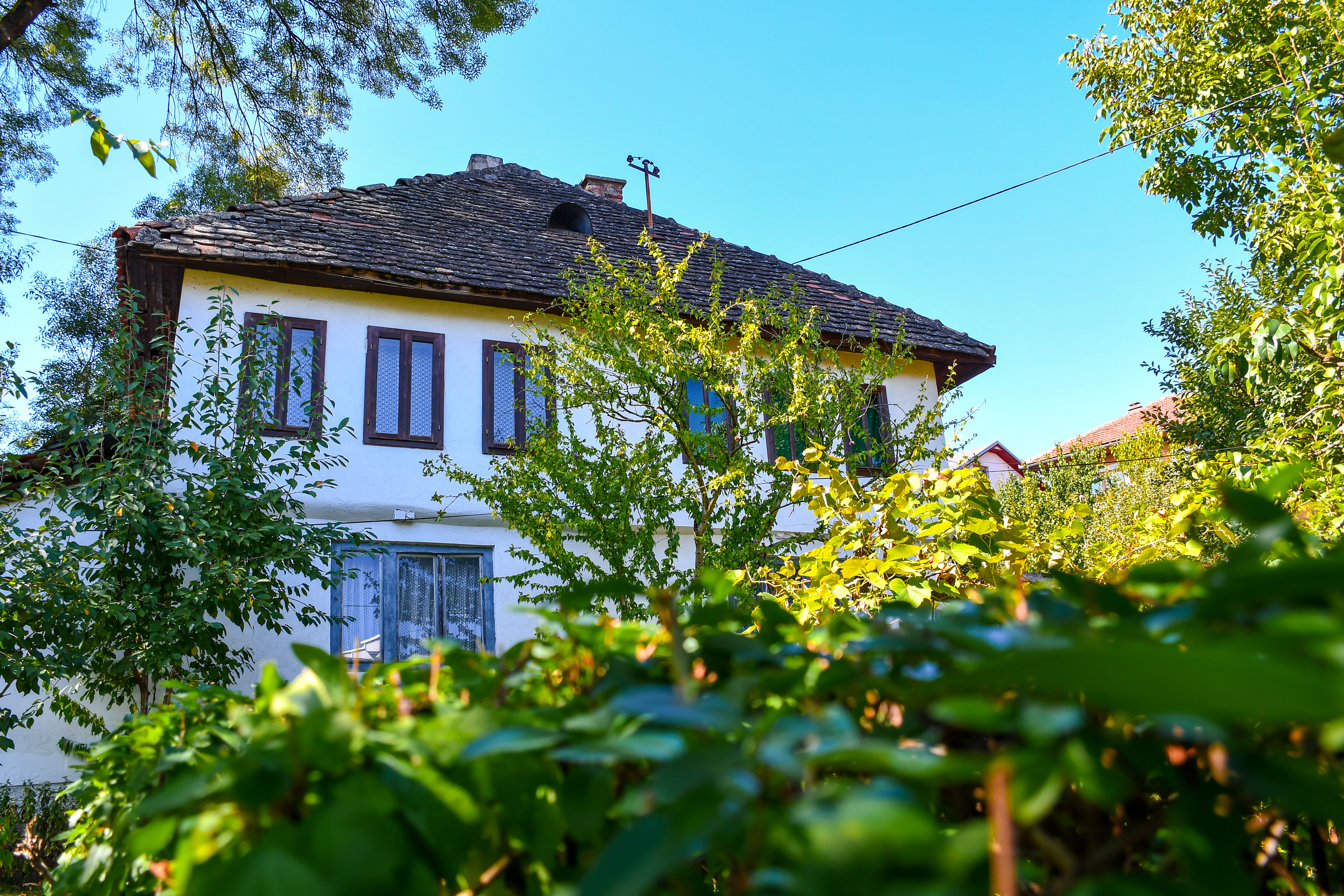 This image was uploaded as part of Trace of Soul 2019.